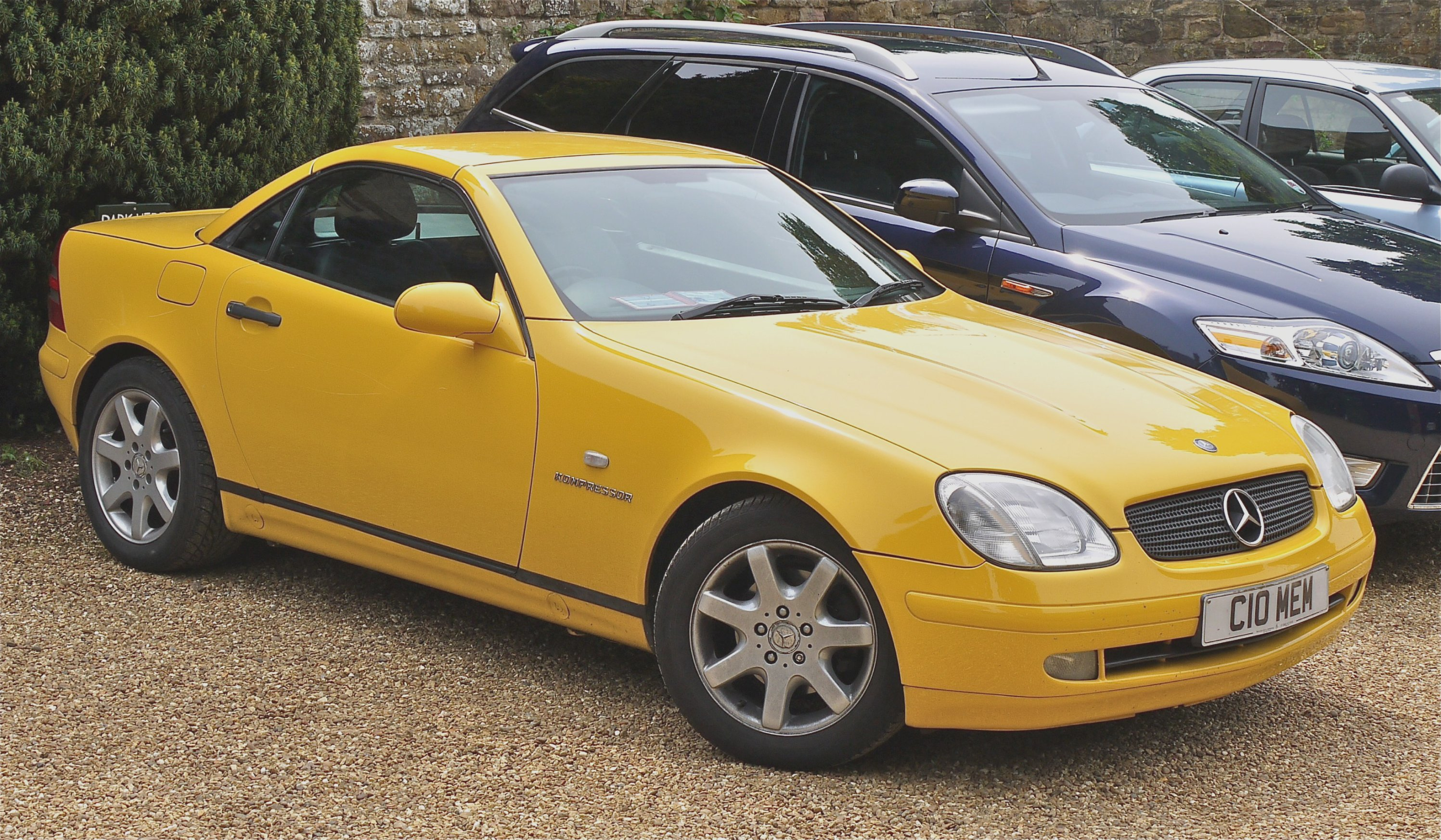 Panasonic G1 14-45 Lens